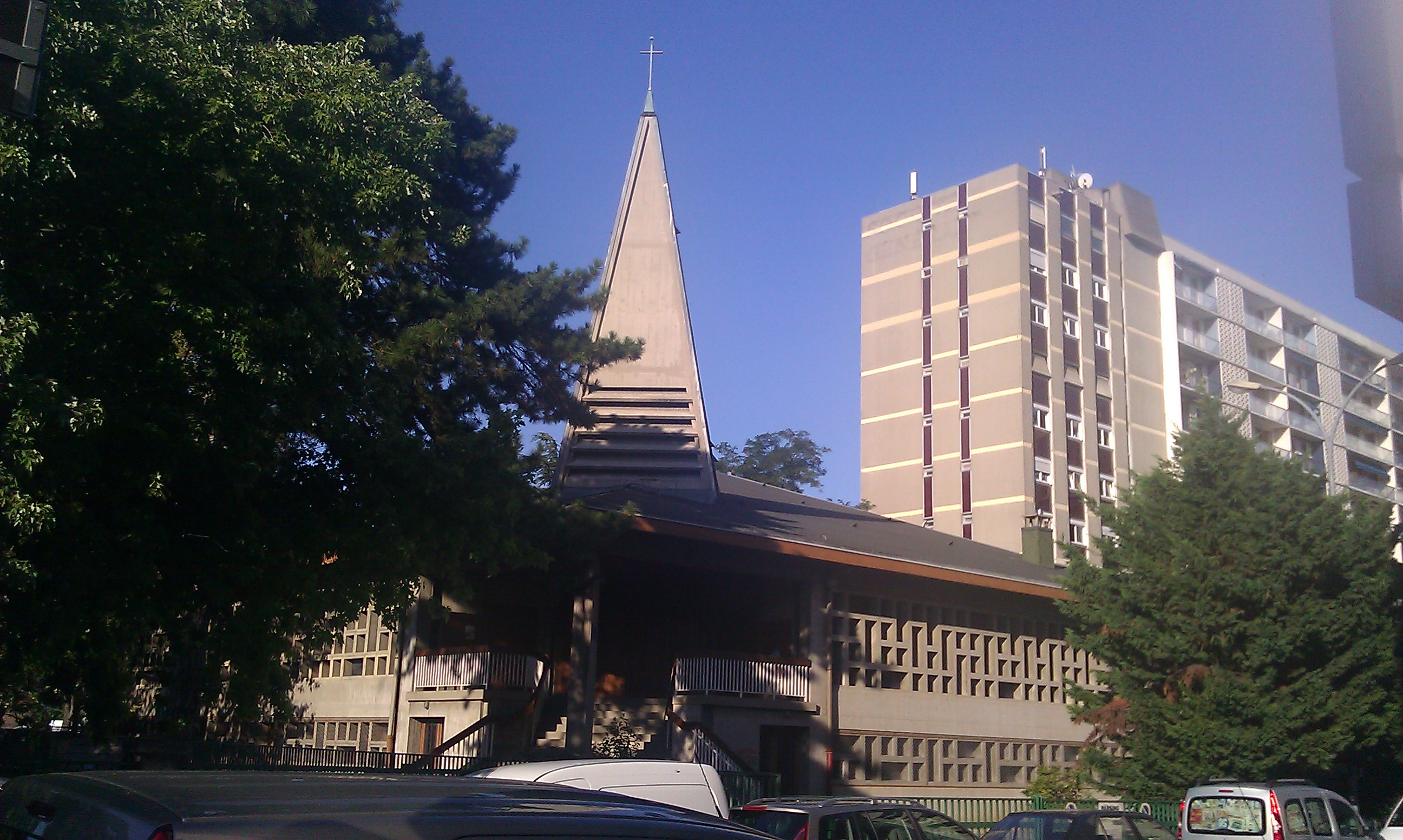 Nouvelle église St-Julien de Cusset à Villeurbanne. Remplace l'église St-Julien de Cusset devenue église St-Athanase.